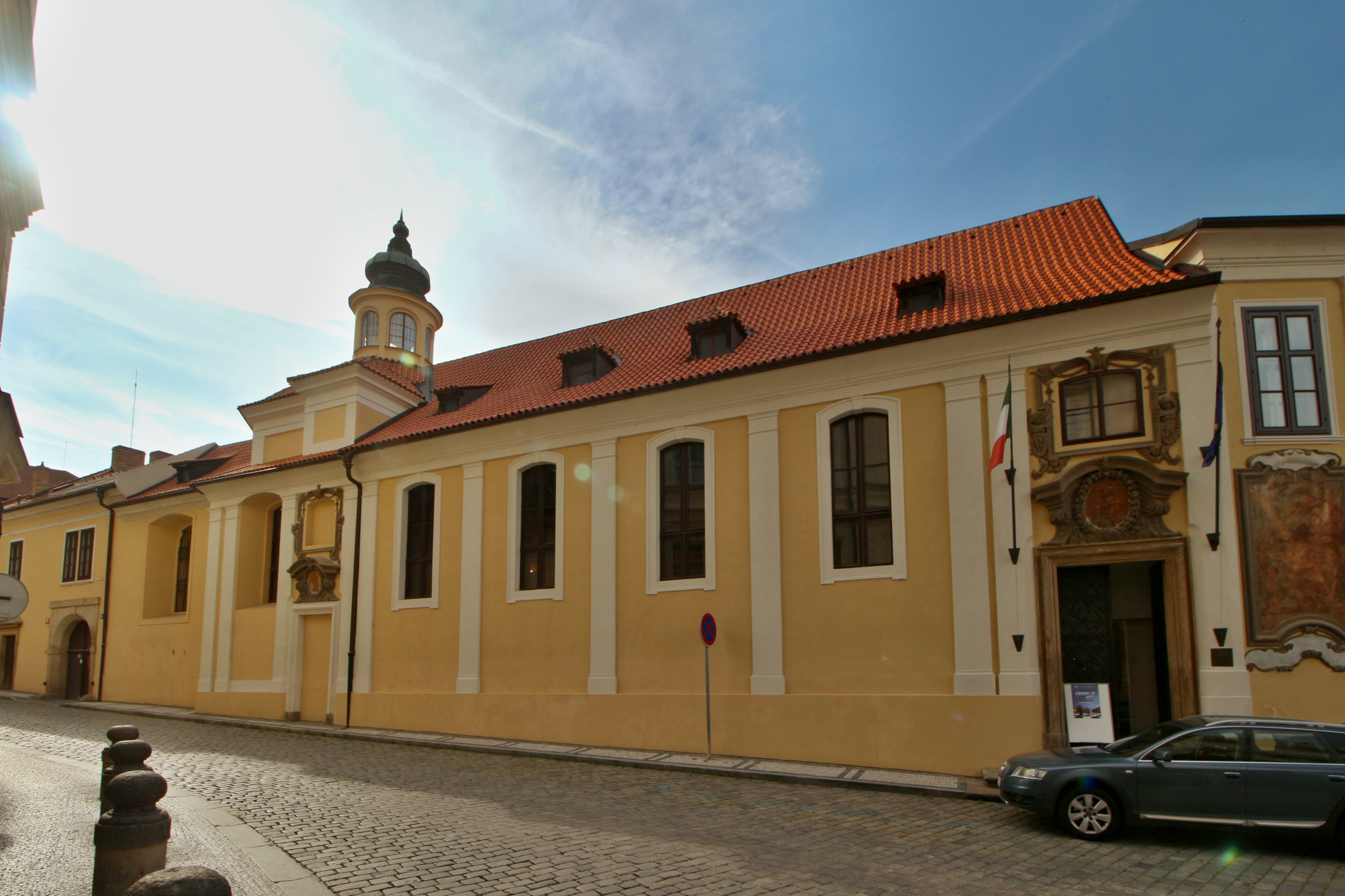 Malá Strana Vlašská ulice